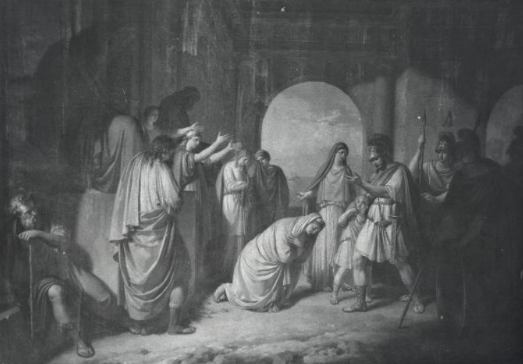 Una scena dipinta da Francesco Caucig che sicuramente ha voluto rappresentare un qualche importante momento della vita concitata di Dione di Siracusa